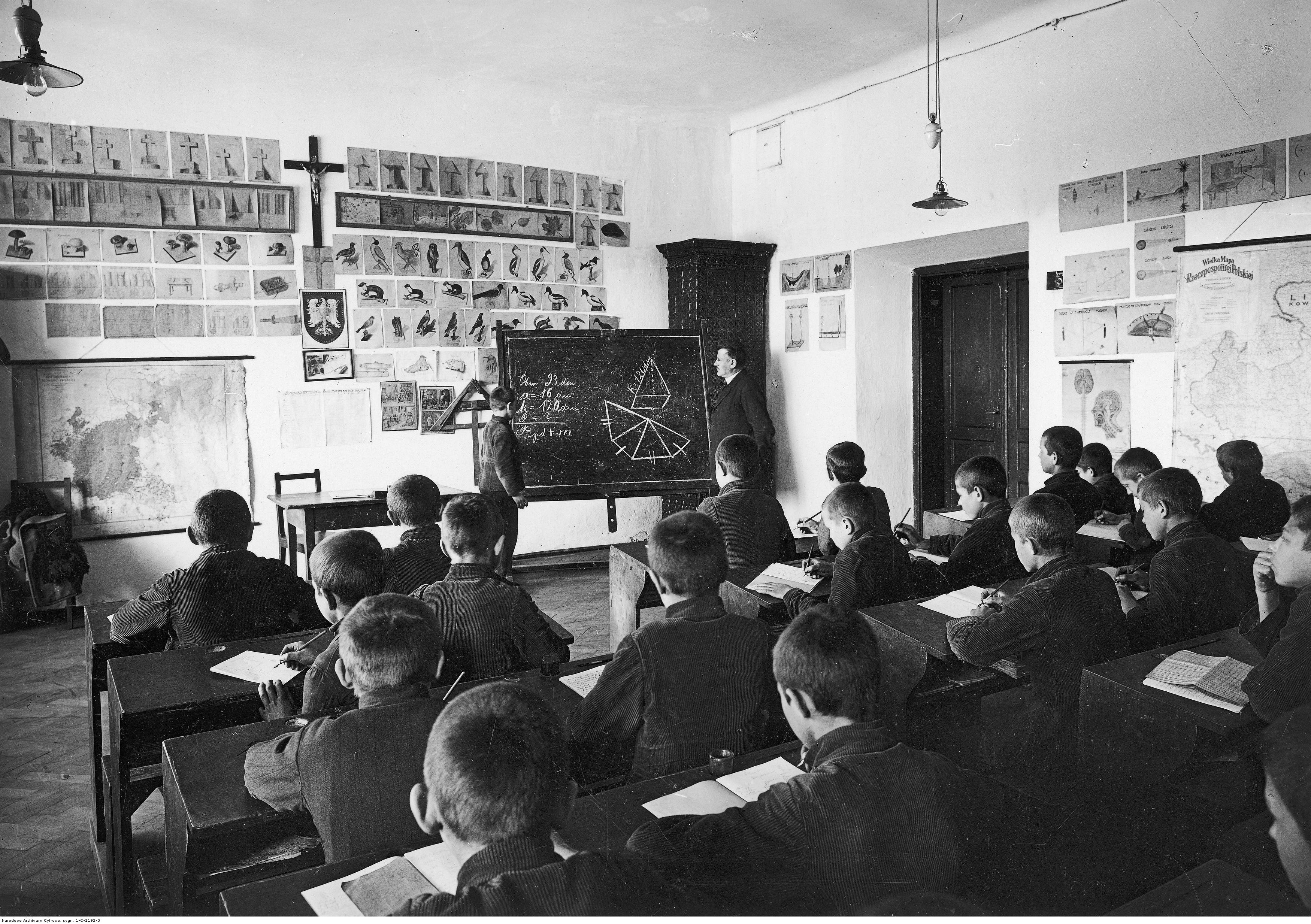 Zakład Sierot i Ubogich w Drohowyżu (1934) lekcja